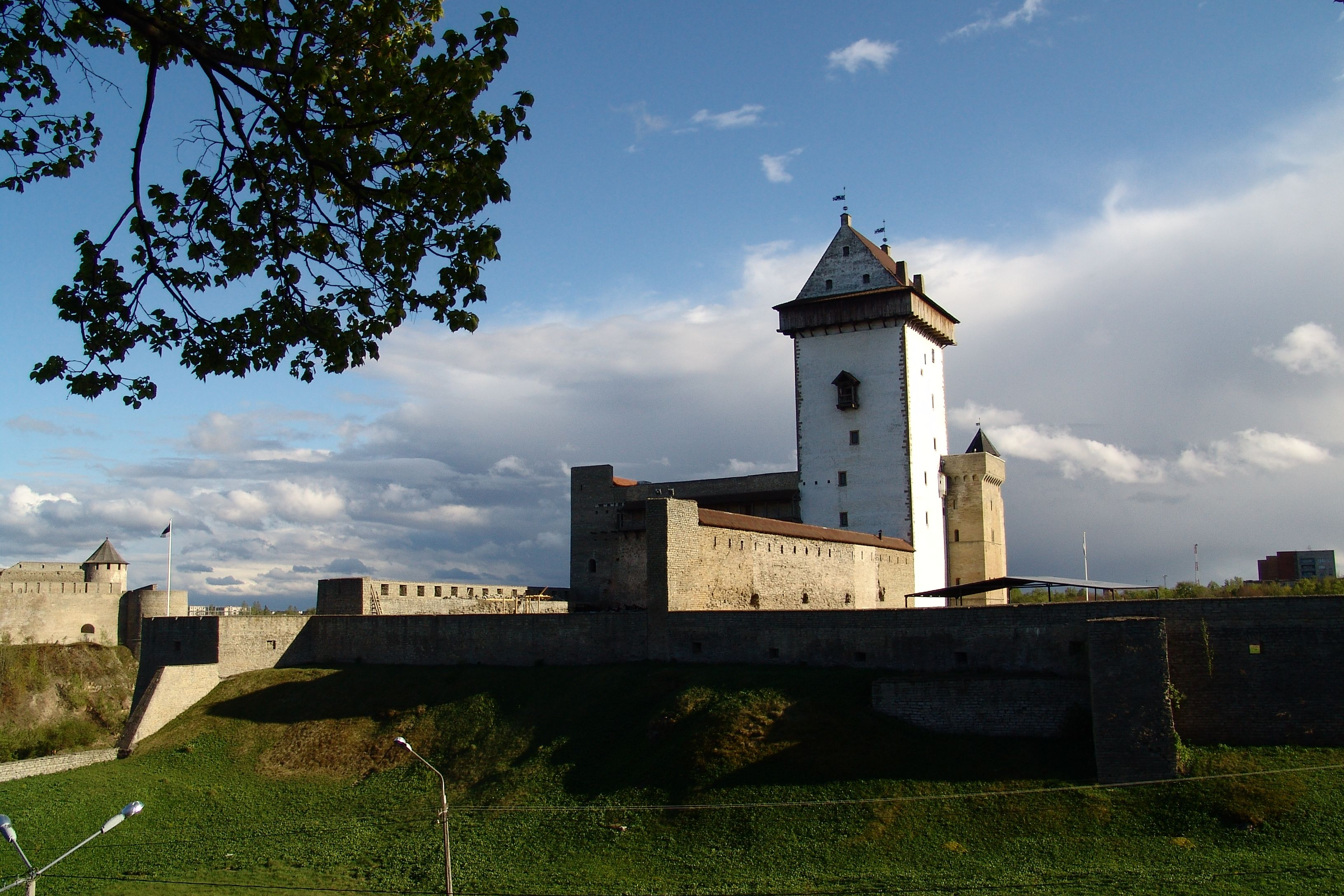 Нарвский замок